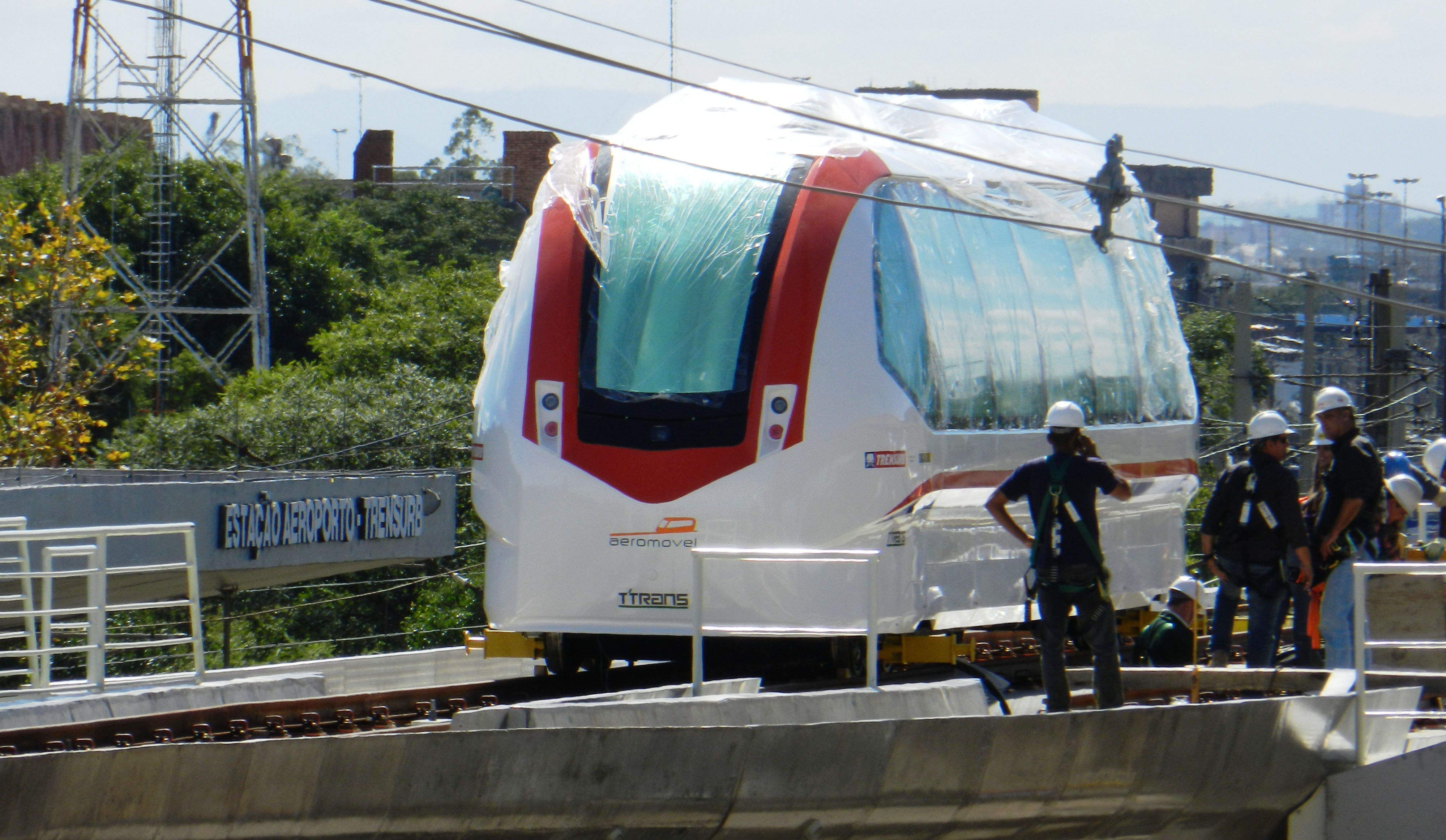 Aeromóvel_2